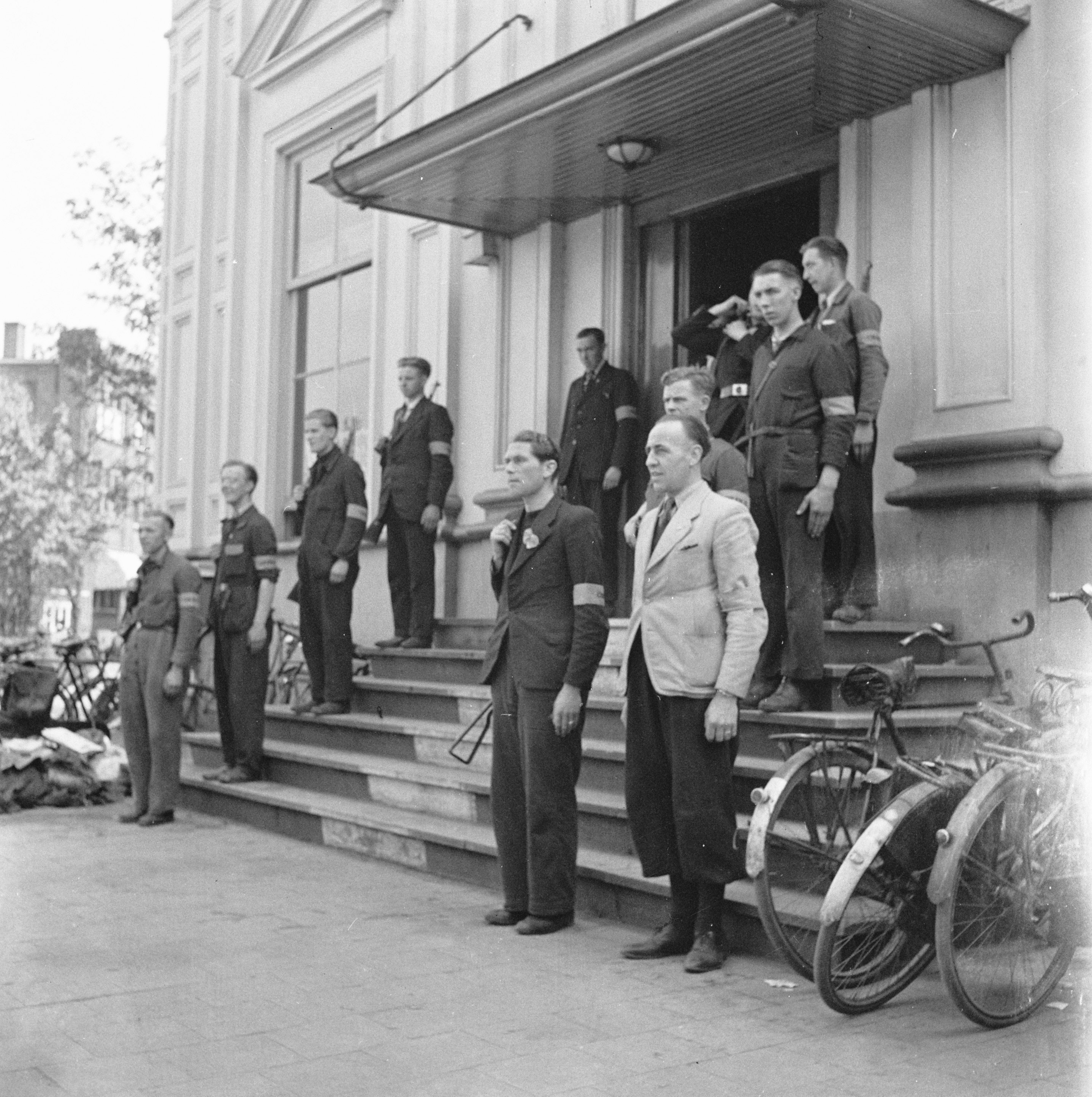 Collectie / Archief : Fotocollectie Anefo Reportage / Serie : Front Noord-Oost Nederland: rondreis Prins Bernhard Beschrijving : De Binnenlandse Strijdkrachten, bewapend met geweren en stenguns, vormen een erewacht Annotatie : Locatie niet bekend Datum : april 1945 Fotograaf : Poll, Willem van de / Anefo, [onbekend] Auteursrechthebbende : Nationaal Archief Materiaalsoort : Negatief (zwart/wit) Nummer archiefinventaris : bekijk toegang 2.24.01.03 Bestanddeelnummer : 900-2491